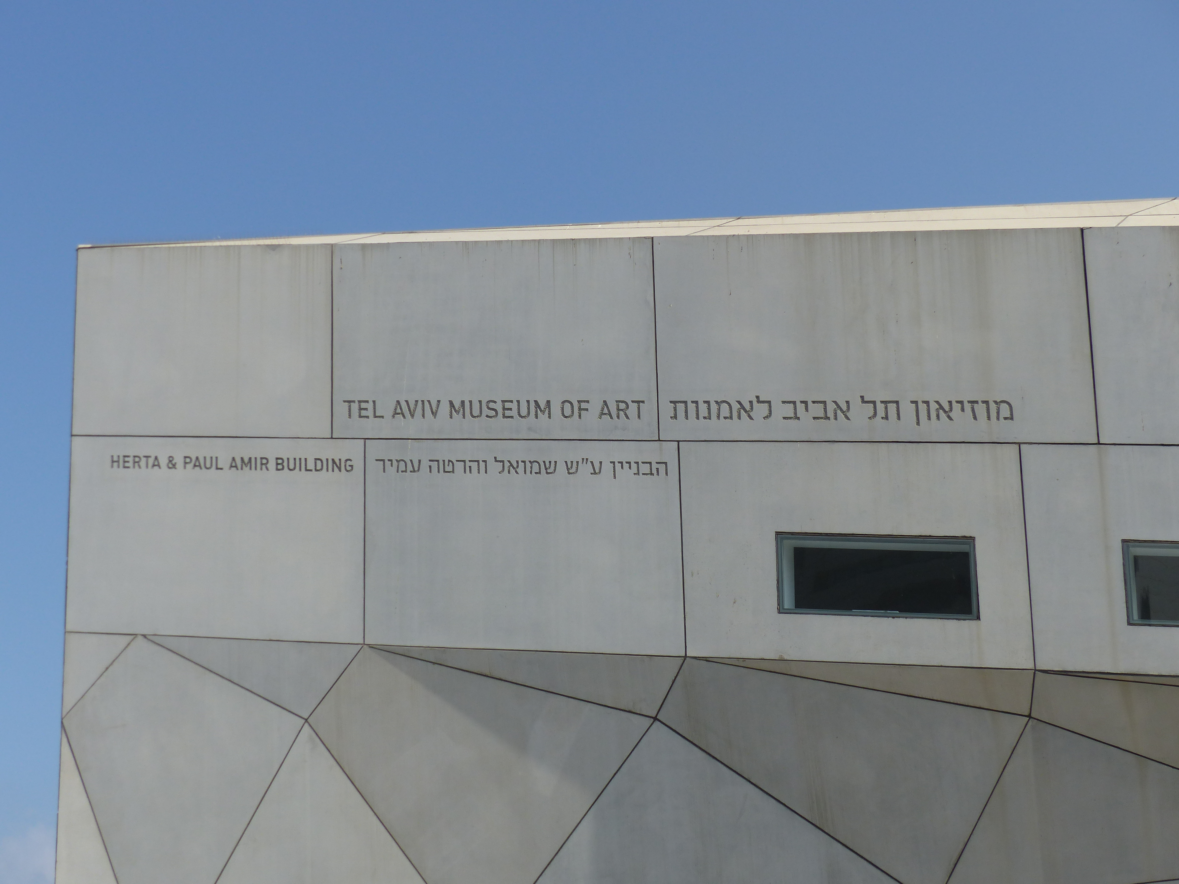 Museo de Arte, Tel Aviv, Israel